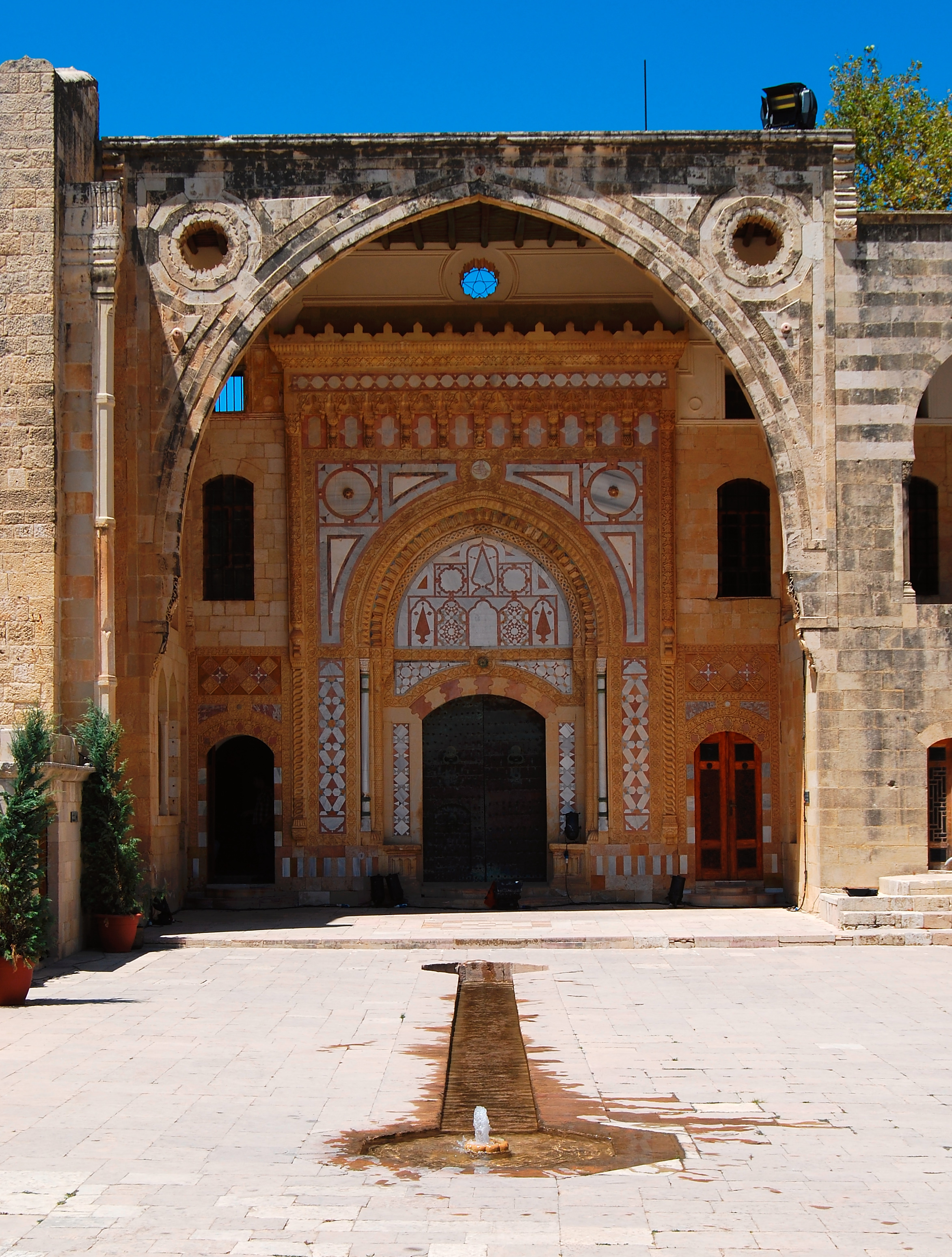 Ornate entrance door, Beiteddine Palace in Lebanon